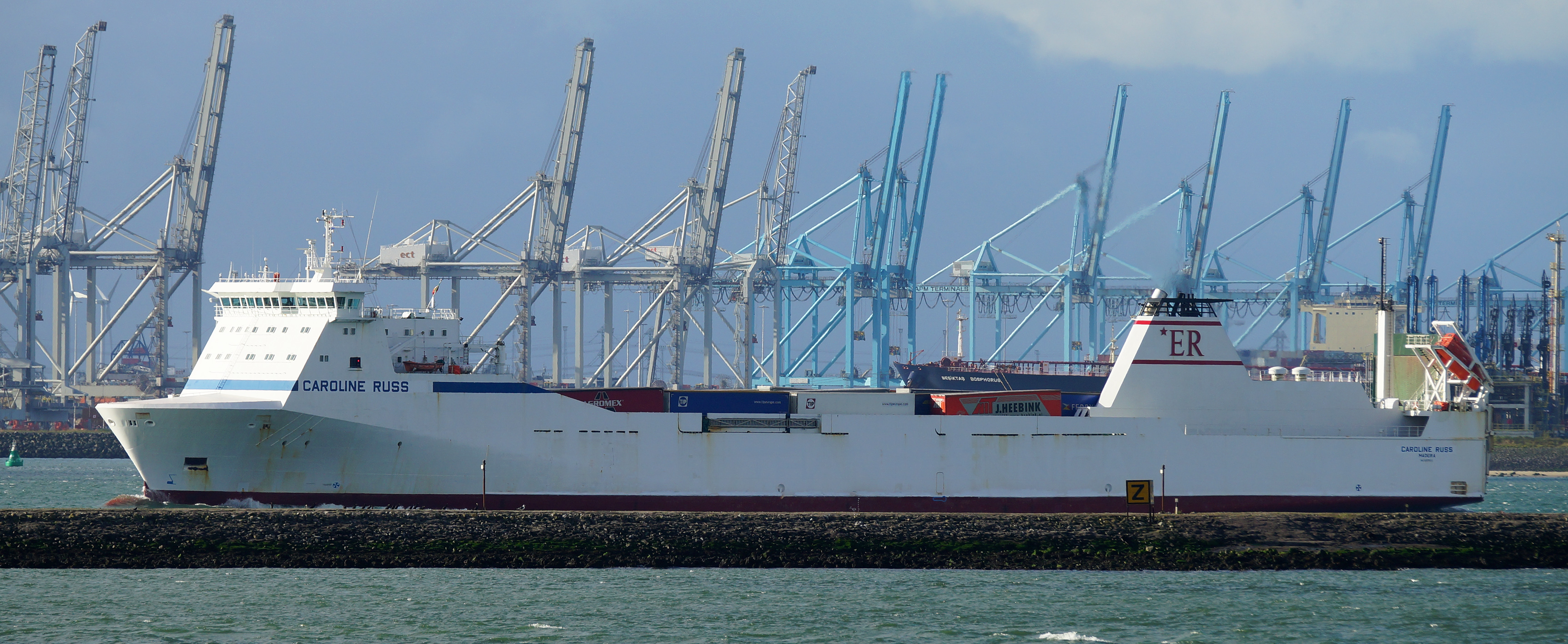 Calandkanaal 2-11-2016